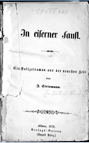 Titelblatt des einzigen erhaltenen Exemplars von Julius Stindes Roman "In eiserner Fasut"